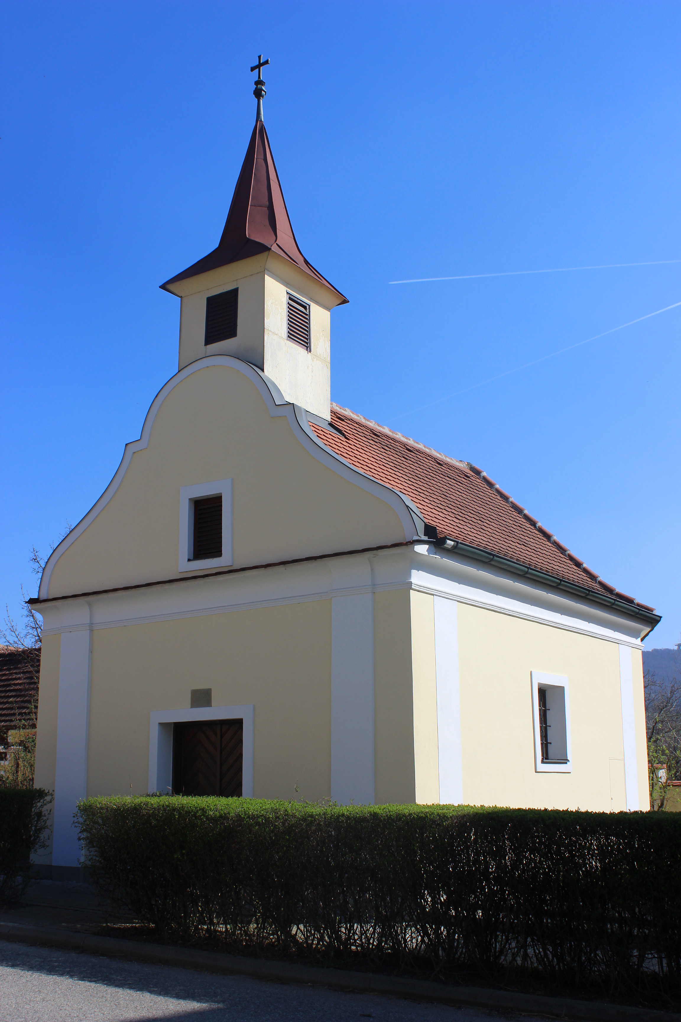 Ortskapelle hl. Bartholomäus